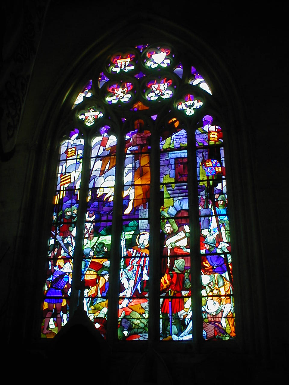 Gwerenn-livet. Emgann ar Roc'h.